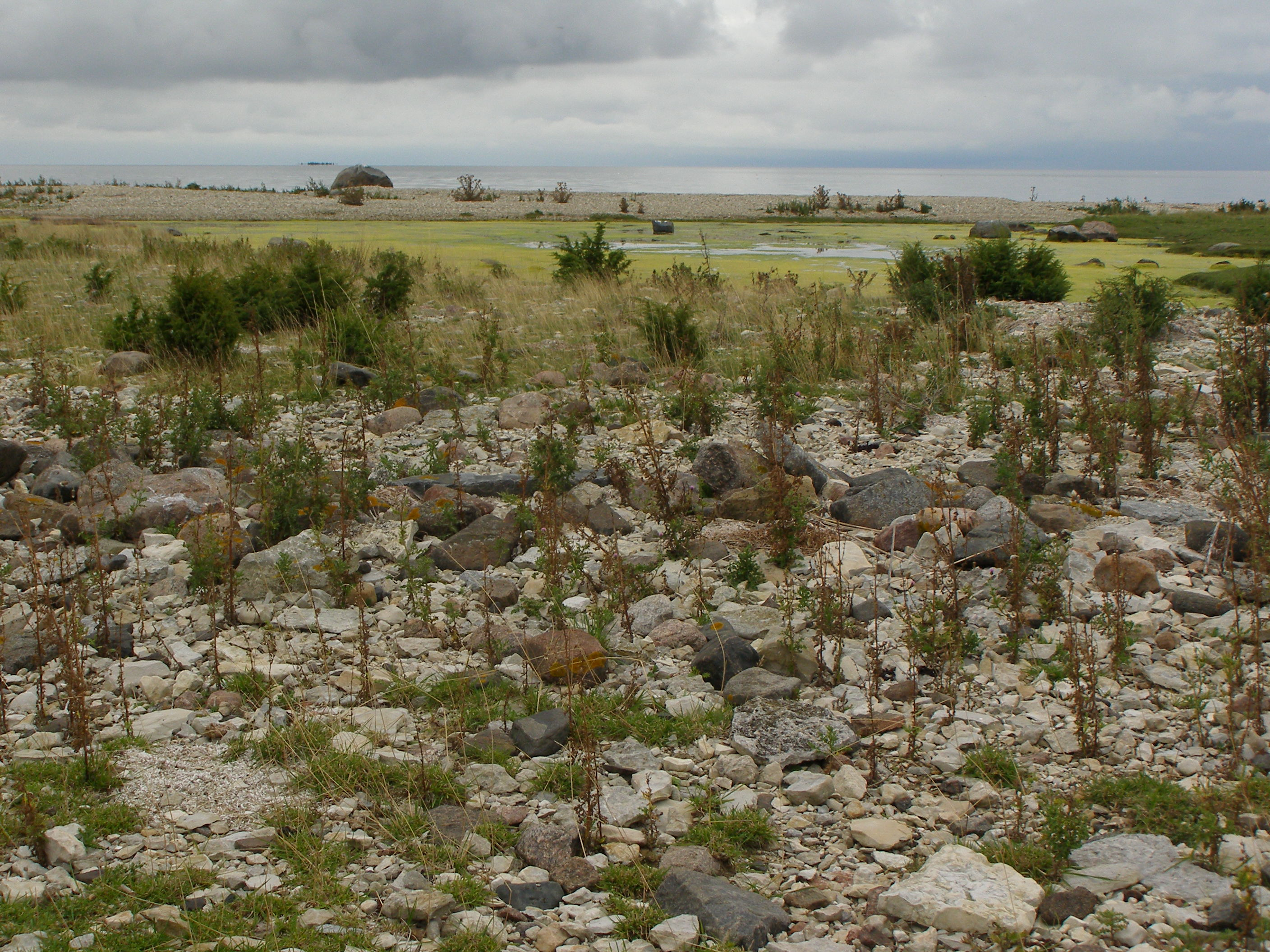 Hanikatsi lõunaots